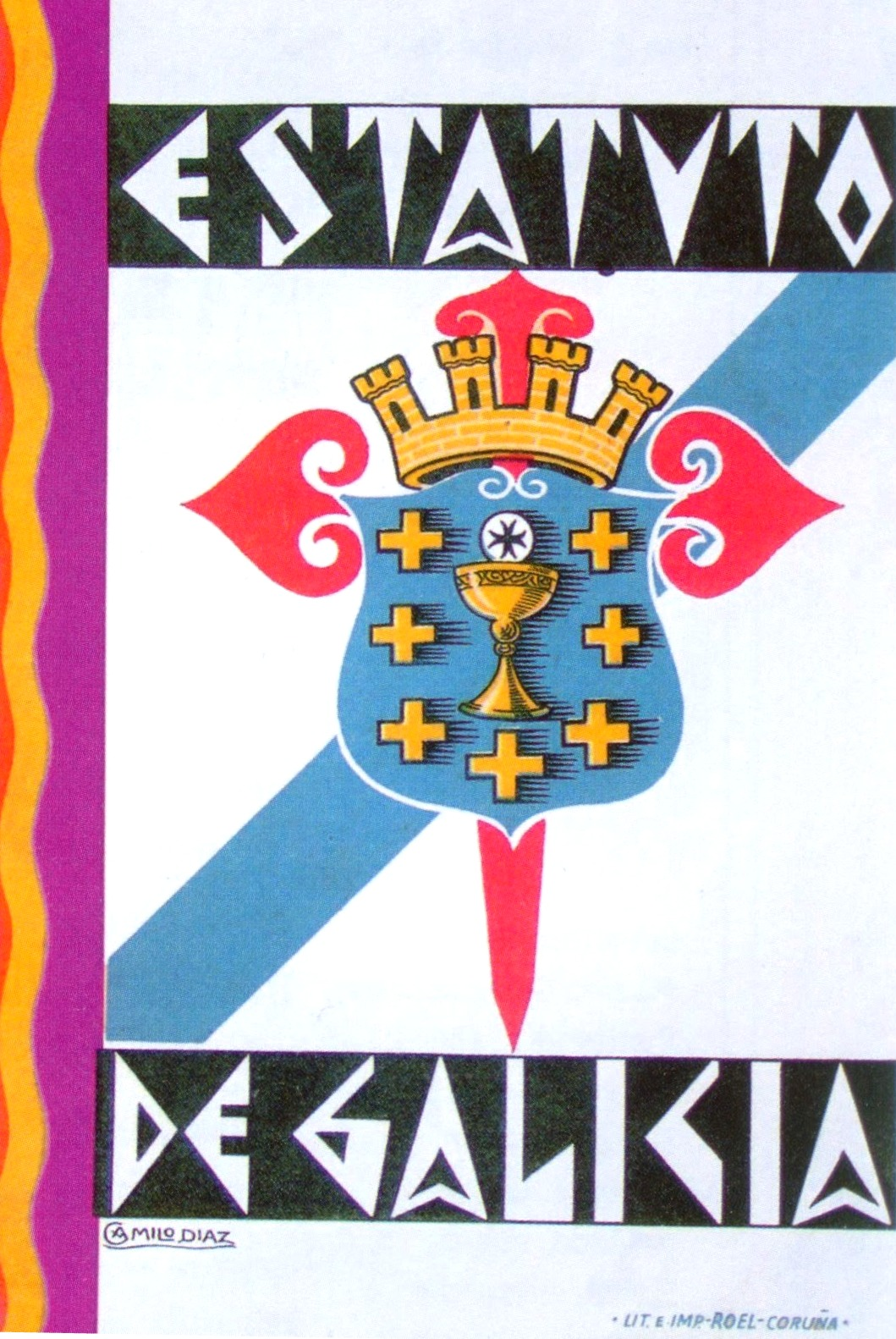 Estatuto de Galicia, Litografía e Imprenta Roel, Coruña, 1932. Esta portada foi impresa por Roel, pero as páxinas interiores, tituladas Autonomía Gallega. El Estatuto de Galicia y La Asamblea Regional de Municipios, foron impresas por Tipografía «El Eco de Santiago».